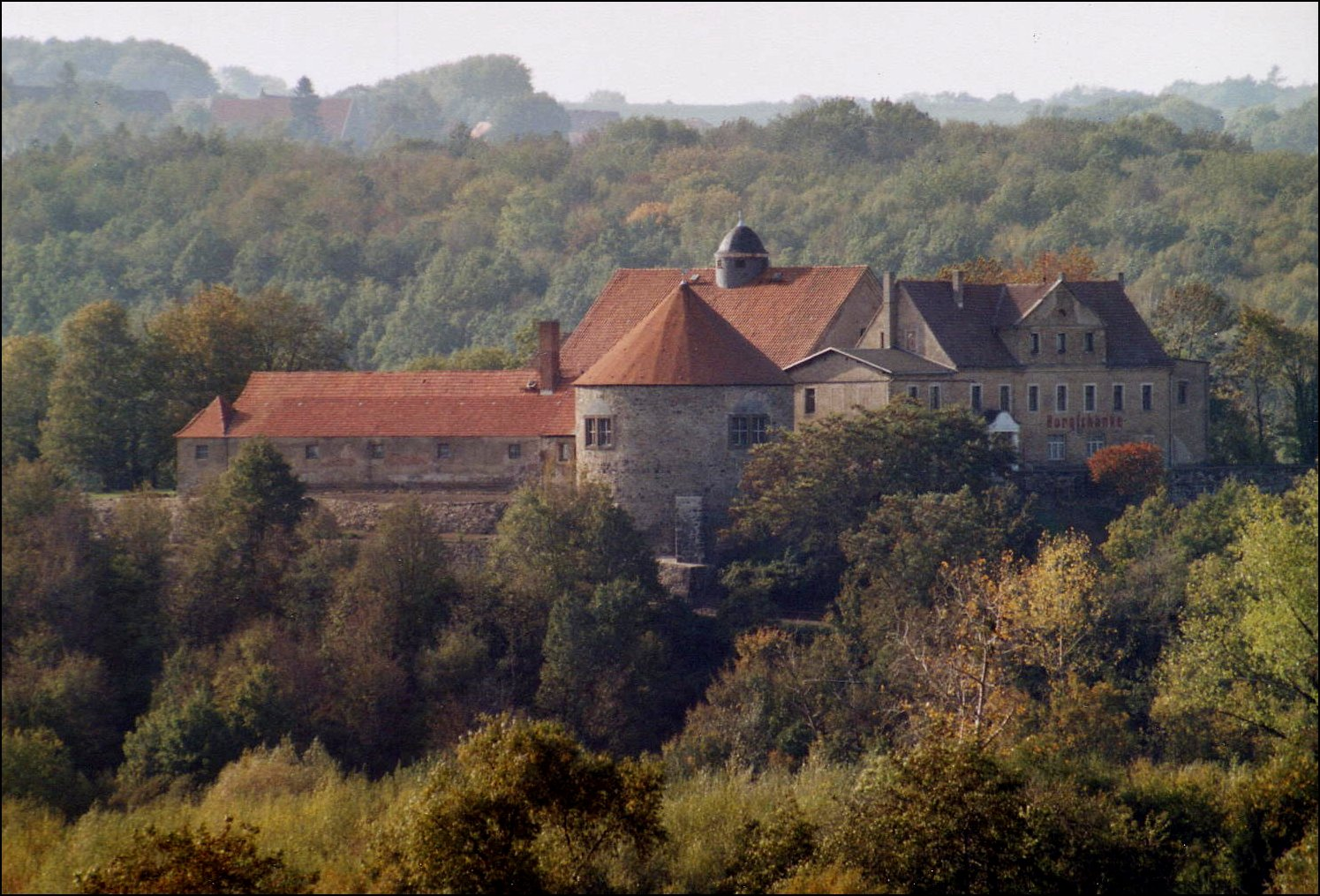 Dohna: Blick auf die Burg